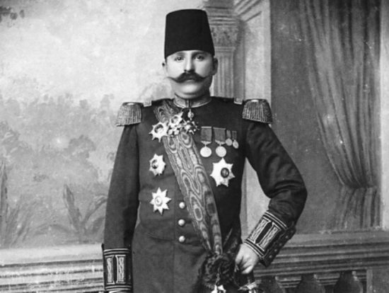 Esat Paşa Toptani